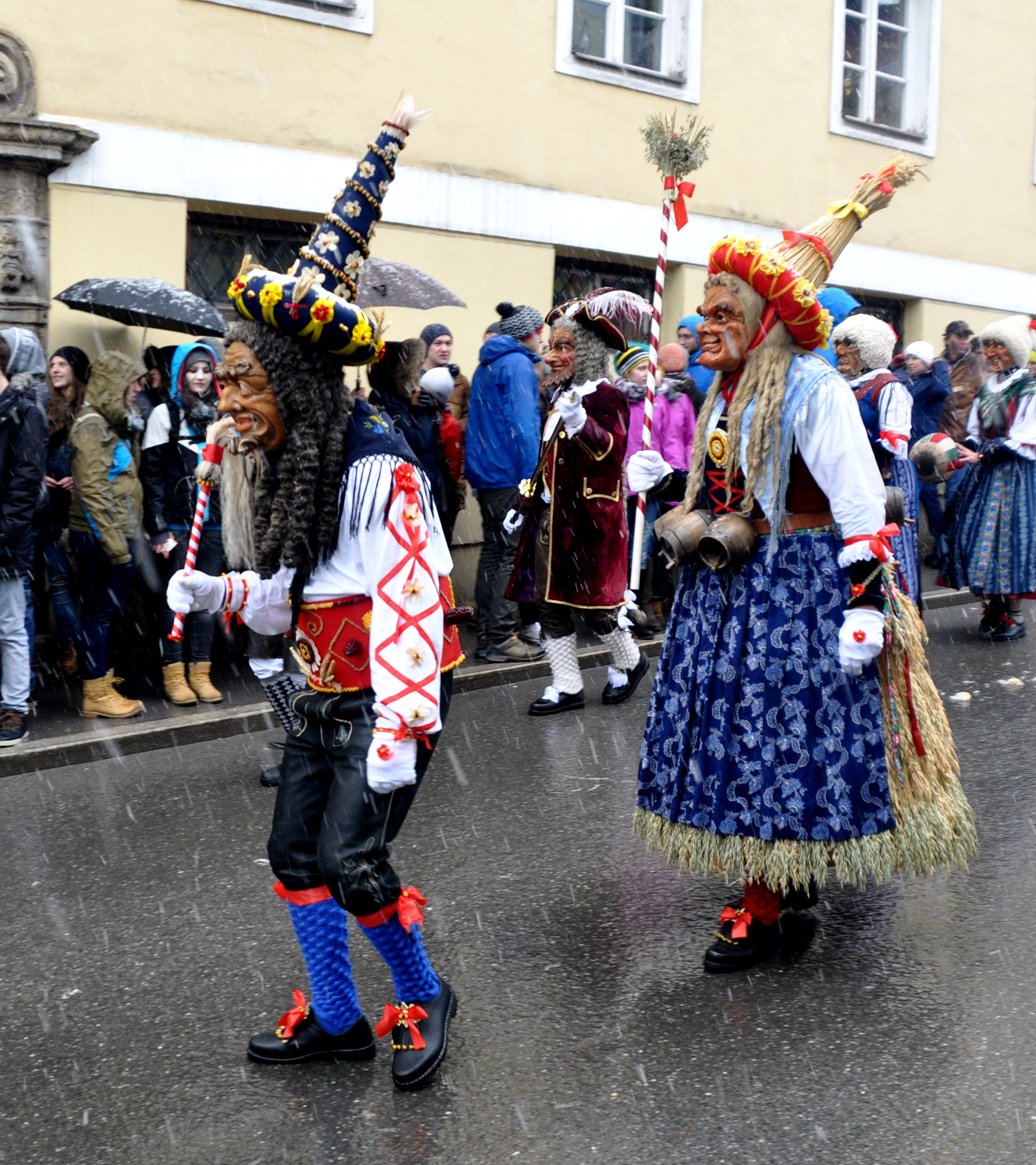 Imst (Tirol), Imster Schemenlaufen 2016, Lagge (Laggeroller und Laggescheller)